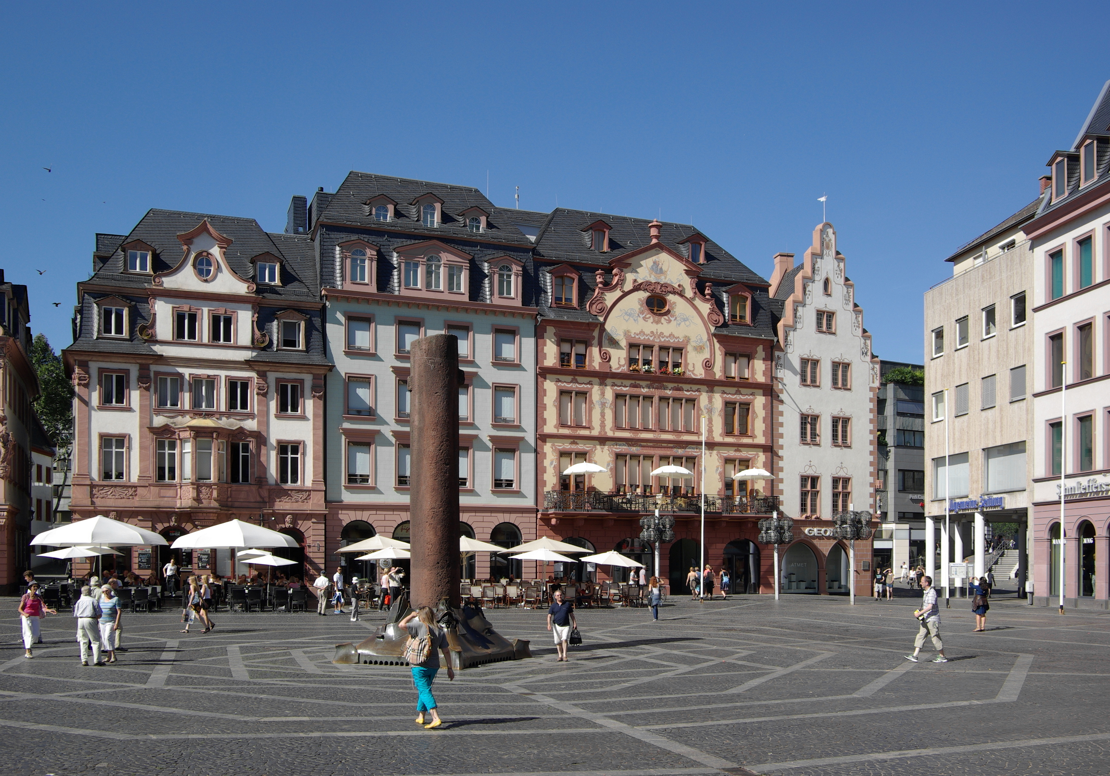 Mainz, Markt, einer der Domplätze